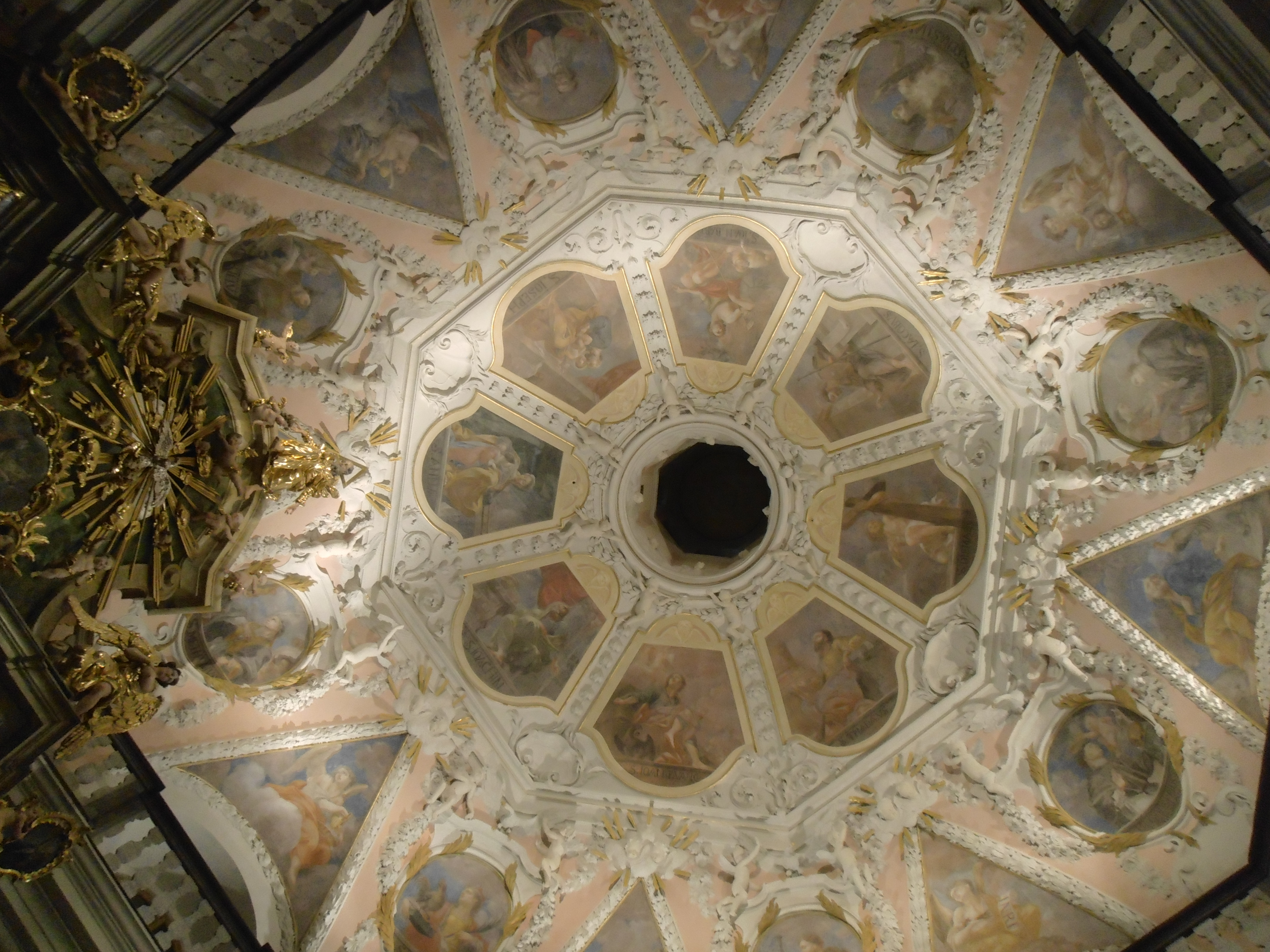 Kostel sv. Jakuba (Jihlava), Jakubské nám. , Jihlava